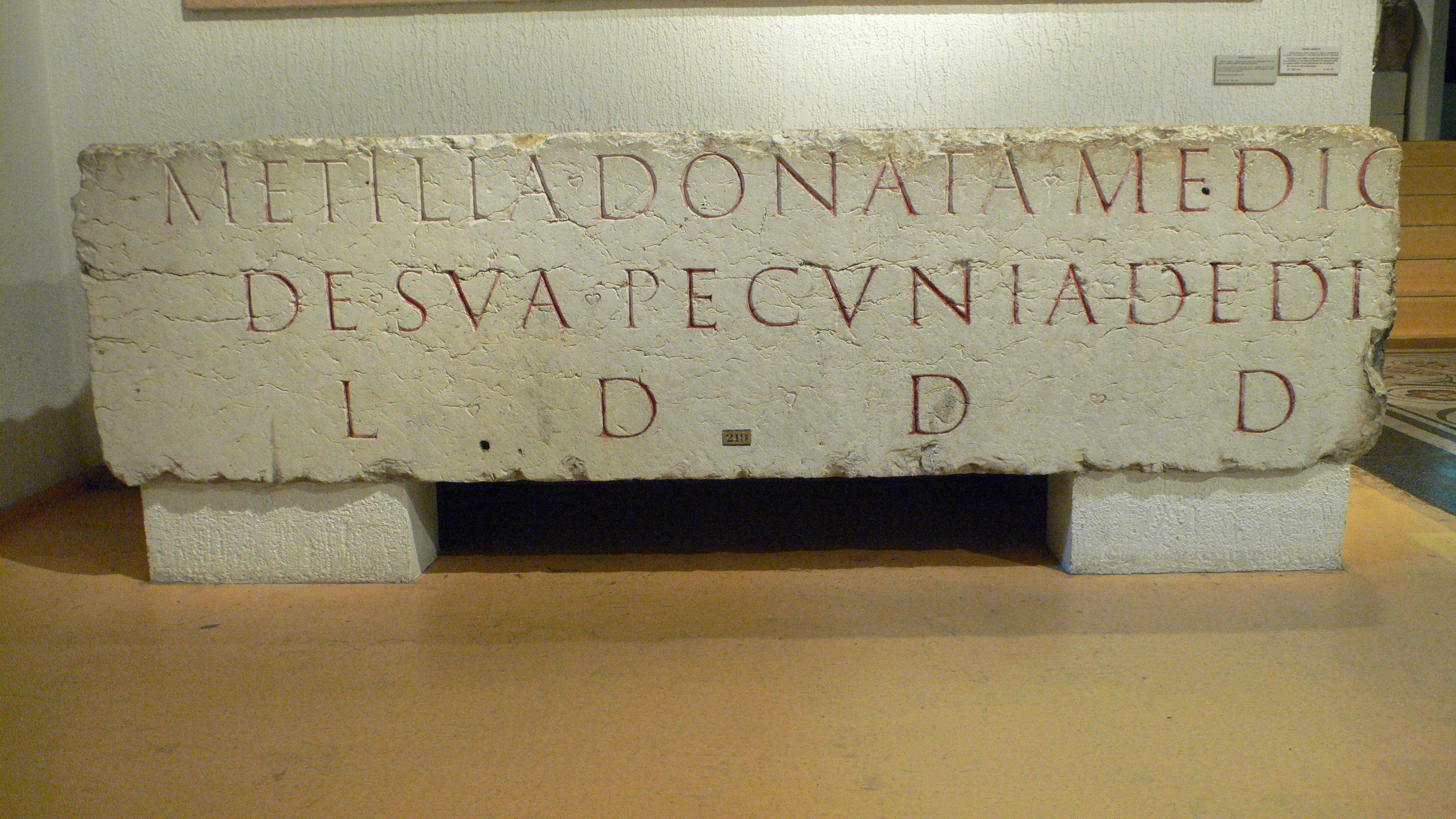 Musée gallo-romain de Fourvière (Lyon) : Inscription évoquant une femme médecin (probablement une accoucheuse) nommée ...Metilia Donata